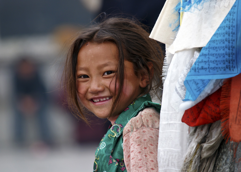 藏族小姑娘